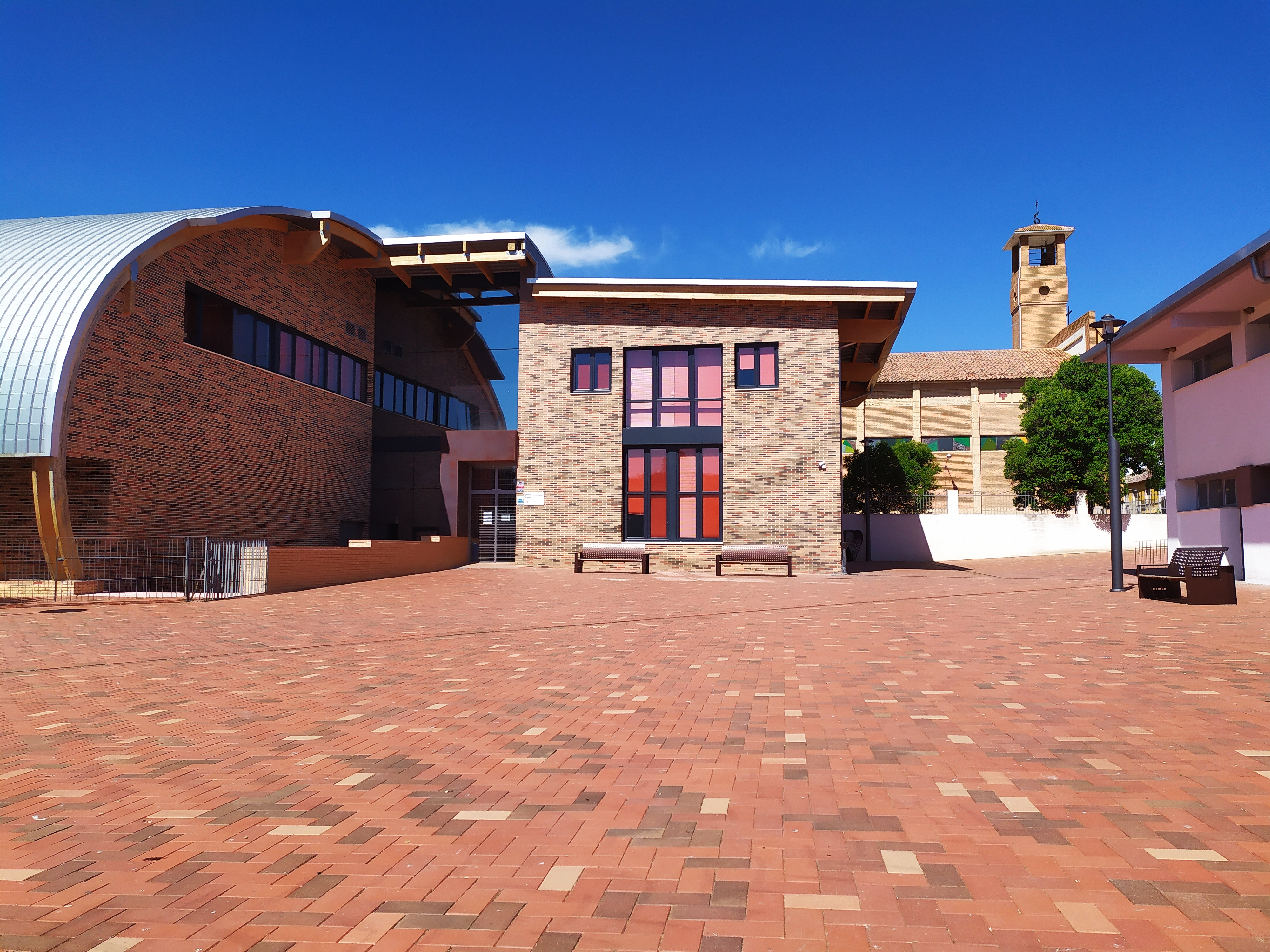 casa de la juventud en Huelma (Jaén)